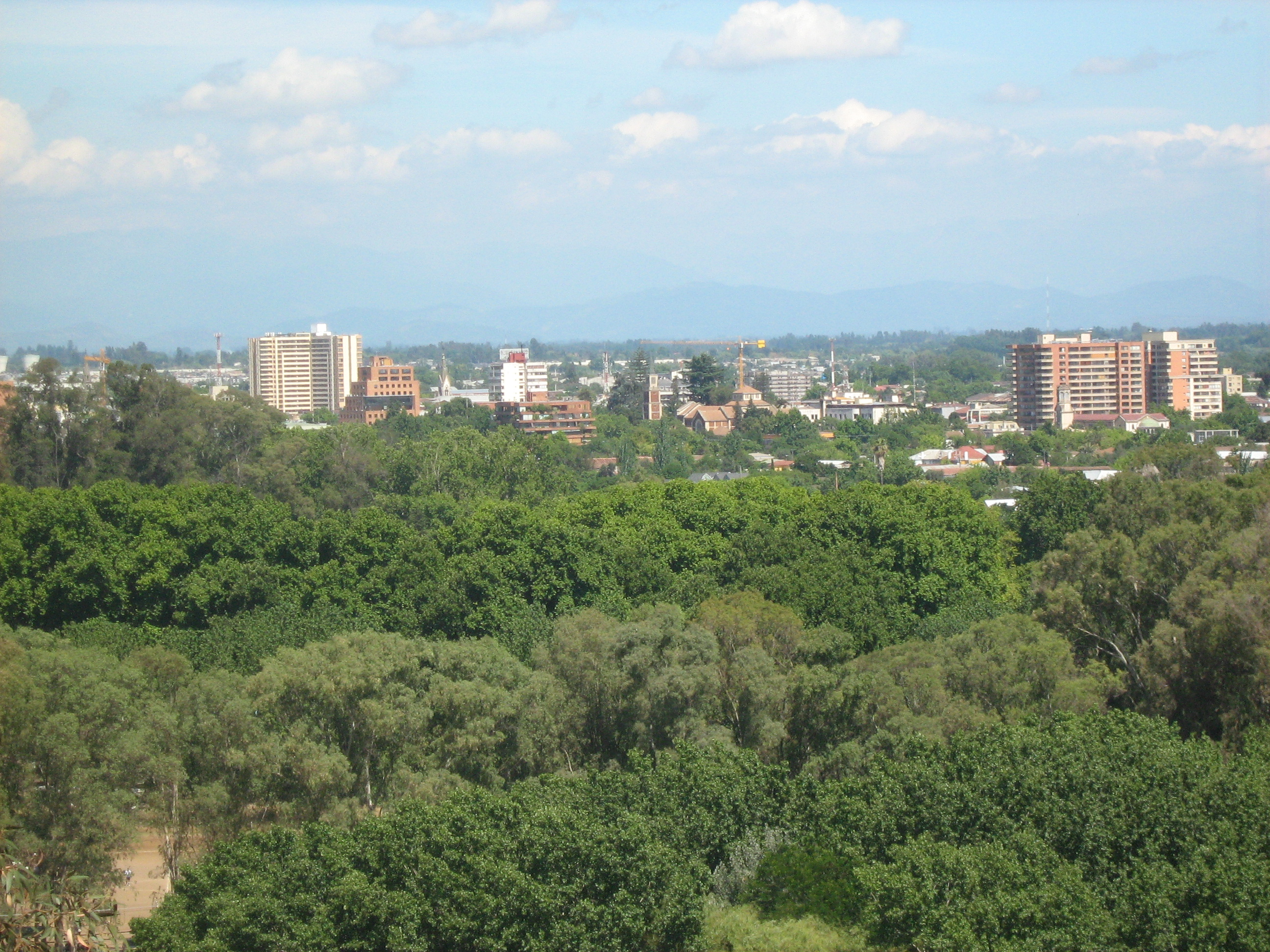 Vista del centro de la ciudad, desde el cerro La Virgen.